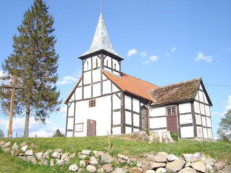 Kościół w Kowalkach.